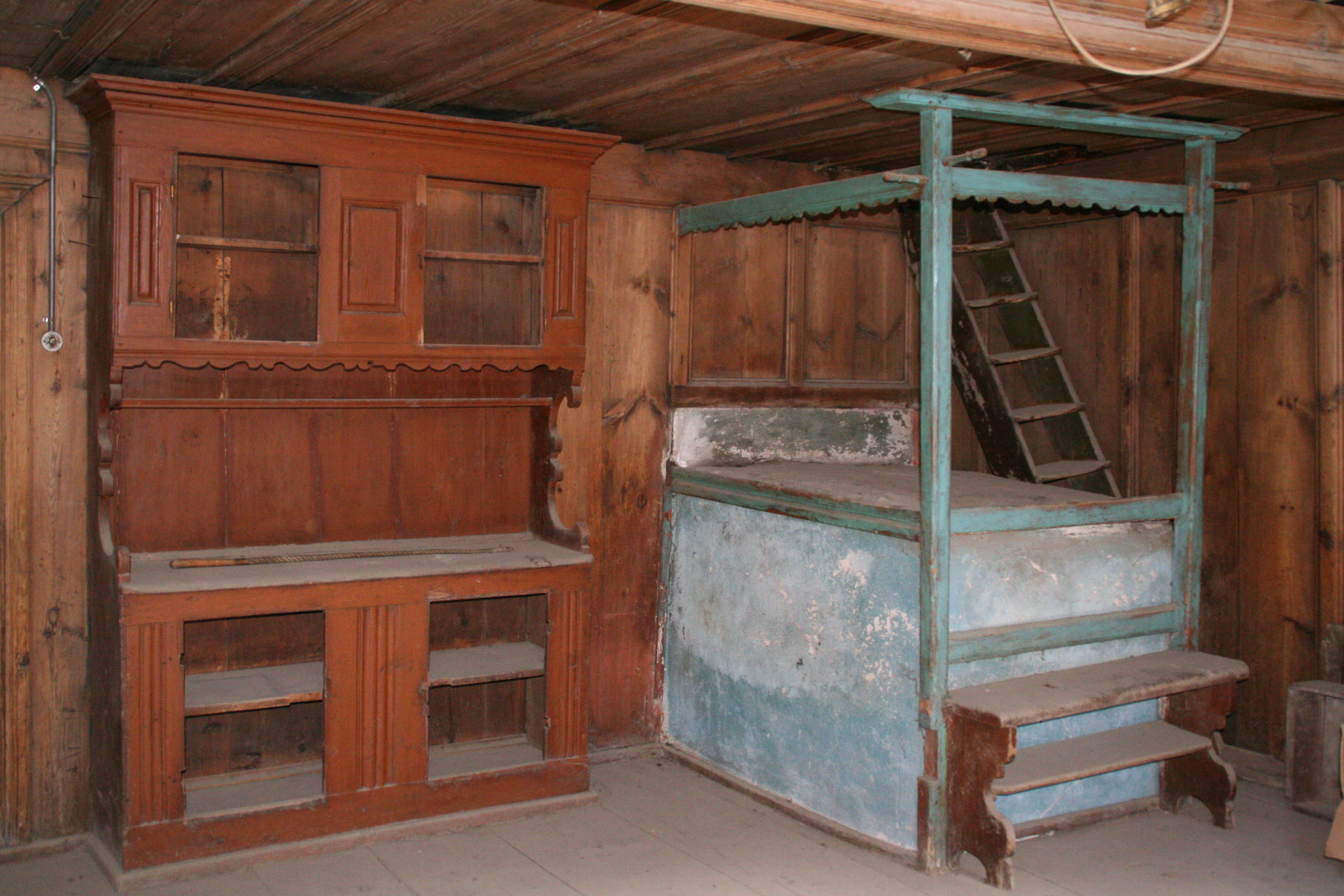 Jooshaus Zimmer mit Ofen